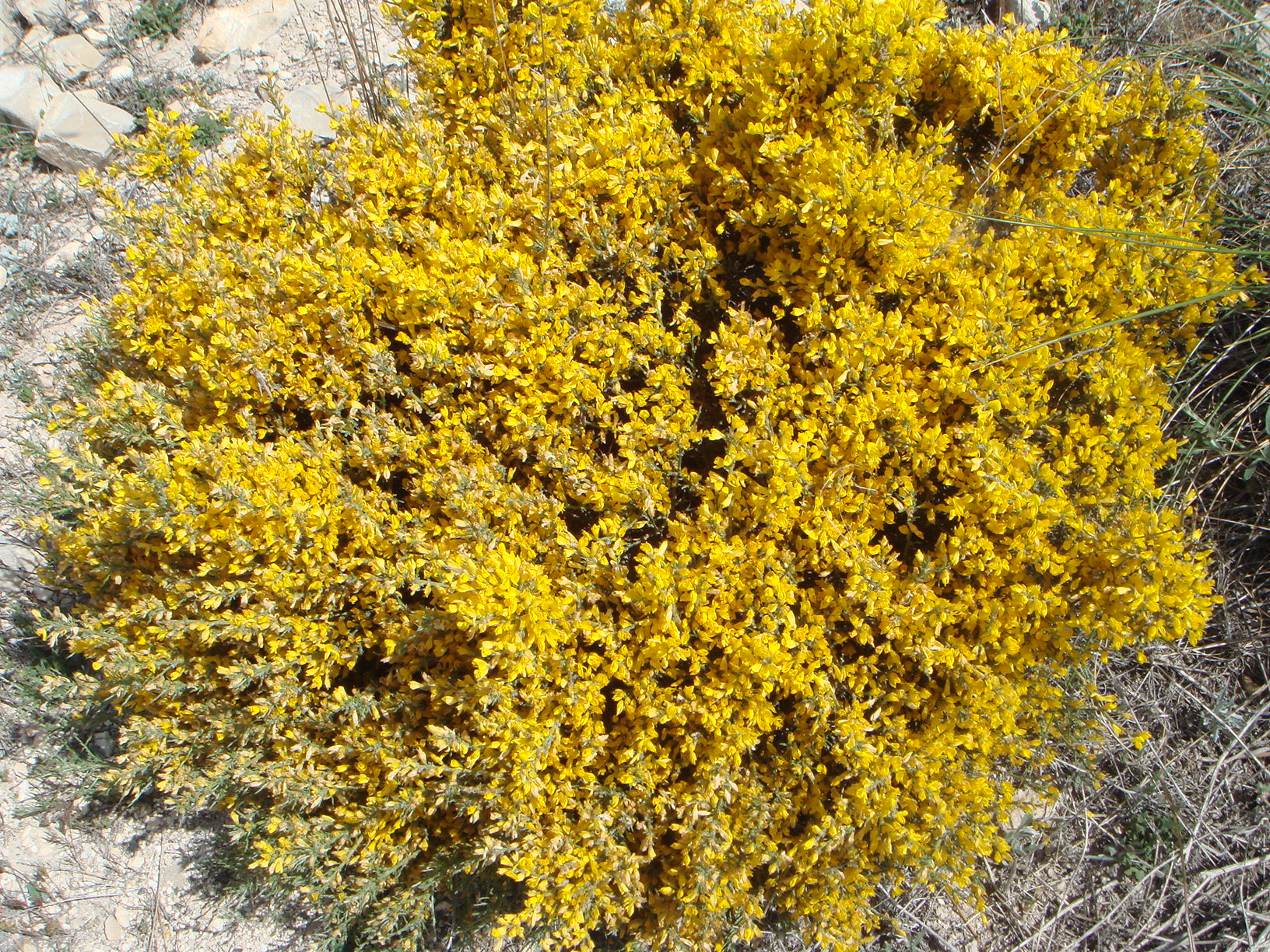 Genista pumila, Hoya de Baza , Granada, España.